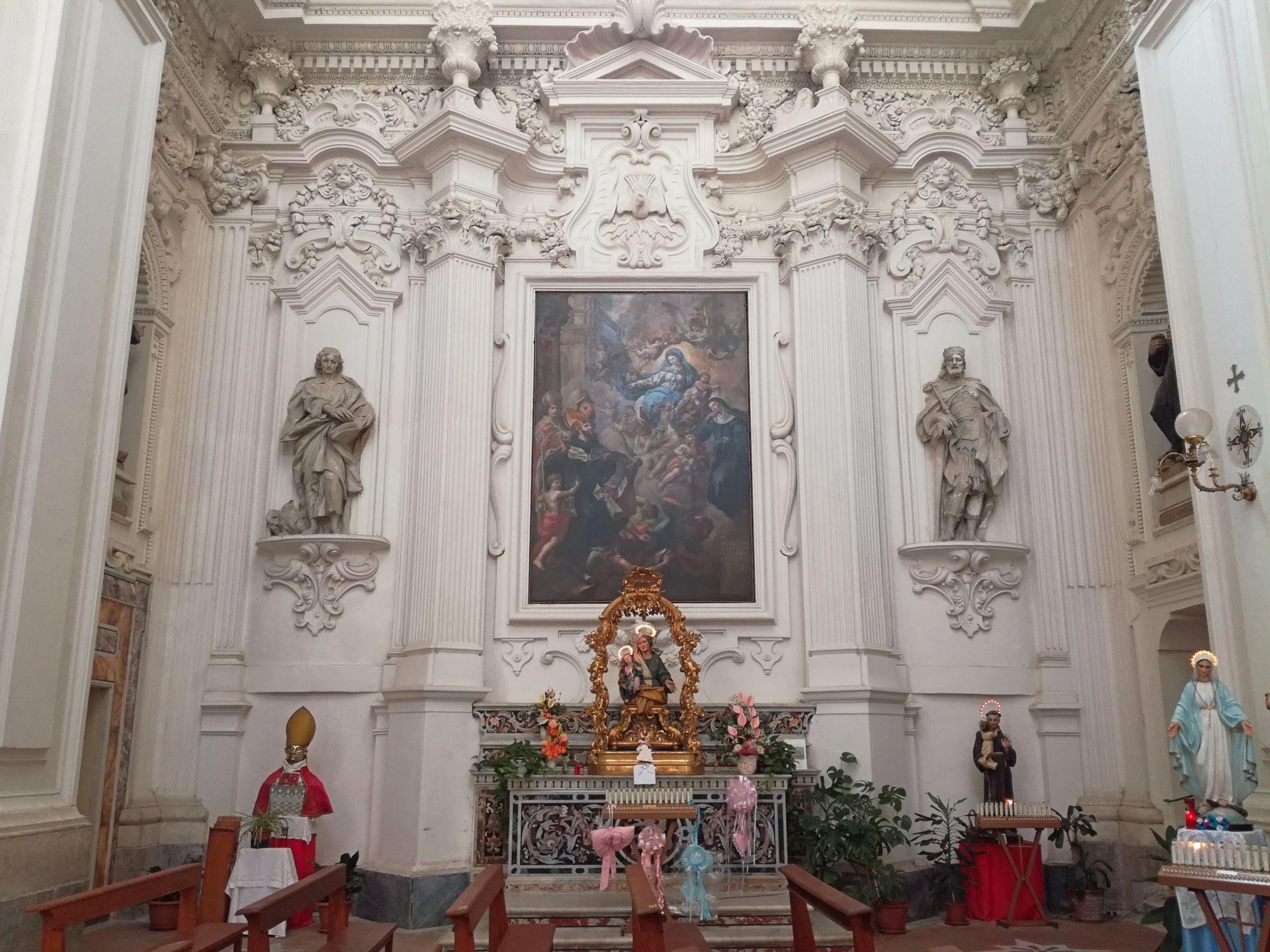 Transetto sinistro Santa Maria della Verità